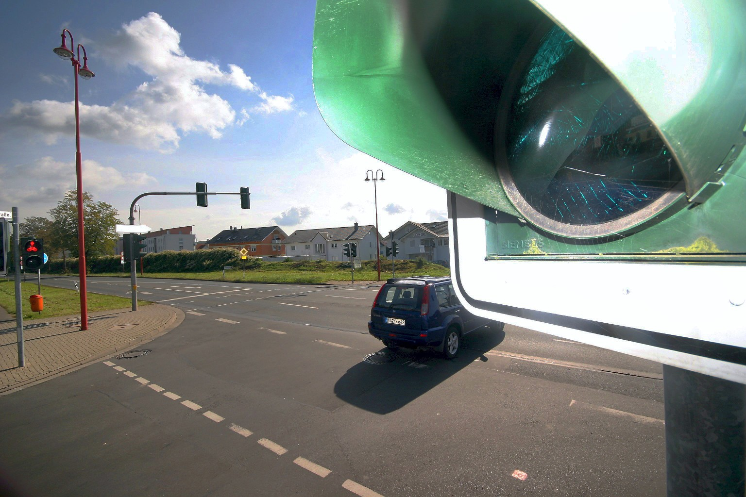 Kreuzung von Bundesstraße 454 (links-rechts) und Wetzlarer Straße (Mitte) in Stadtallendorf. Sie soll ab Mai 2011 durch die Tieferlegung der Bundesstraße entfallen.